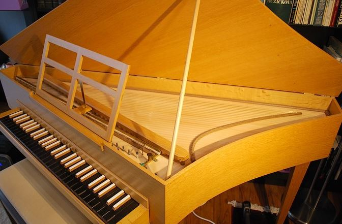 Epinette Neupert-Zenti en référence au facteur italien Girolamo Zenti qui introduisit, vers 1637, en Italie, ce petit clavecin en forme d'aile d'oiseau. L'instrument est transpositeur.